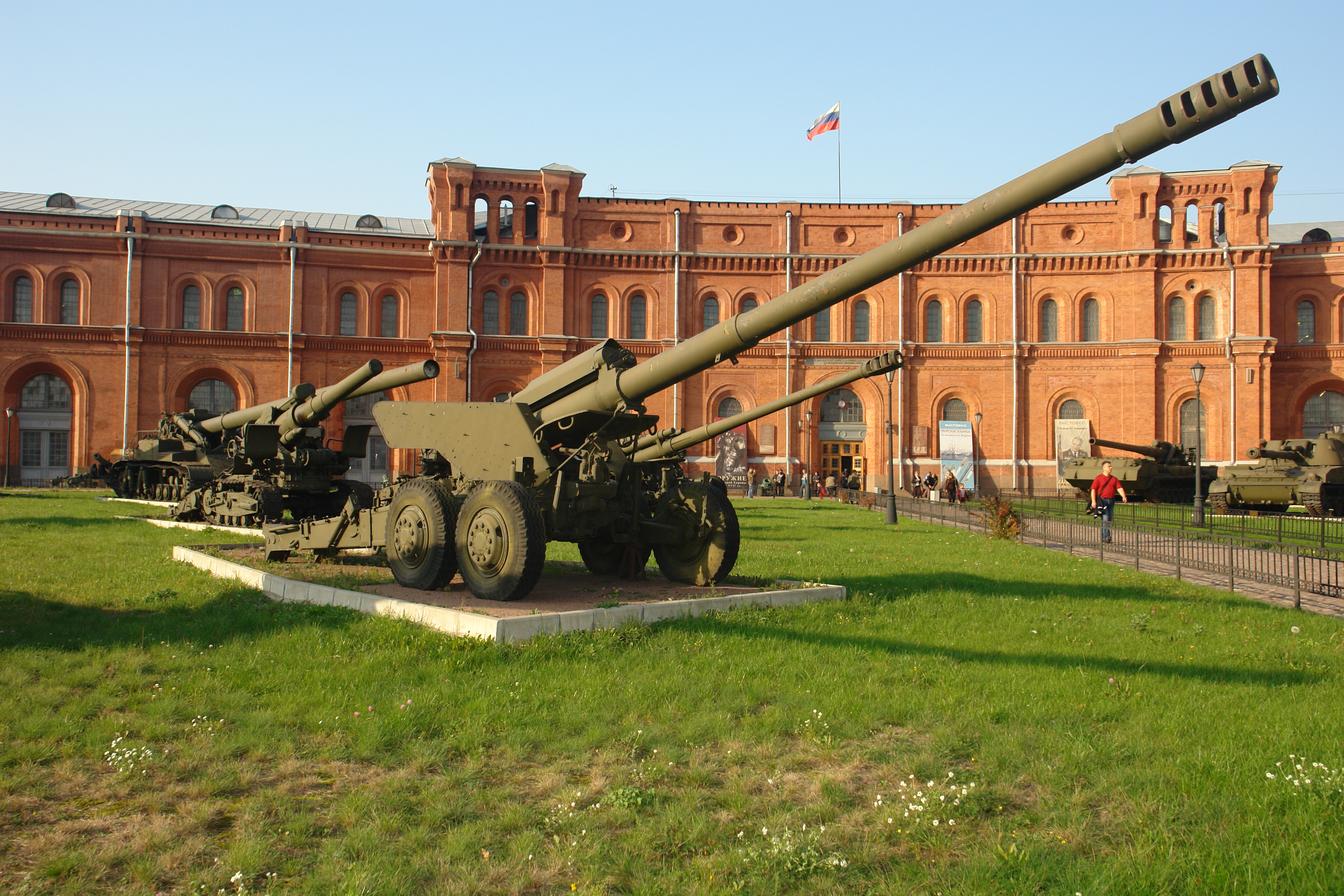 152-мм пушка 2А36 «Гиацинт-Б» (1979). Главный конструктор Ю.Н. Калачников. Дальность стрельбы, м - 27500, активно-реактивным снарядом - 32820. Скорострельность - 5-6 выстр/мин. Масса, кг: орудия - 9760, снаряда - 46. Расчет - 8 человек. Военно-исторический музей артиллерии, инженерных войск и войск связи, Санкт-Петербург.